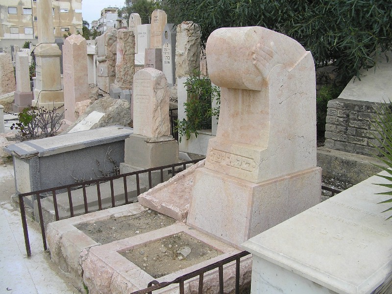 Sculpture